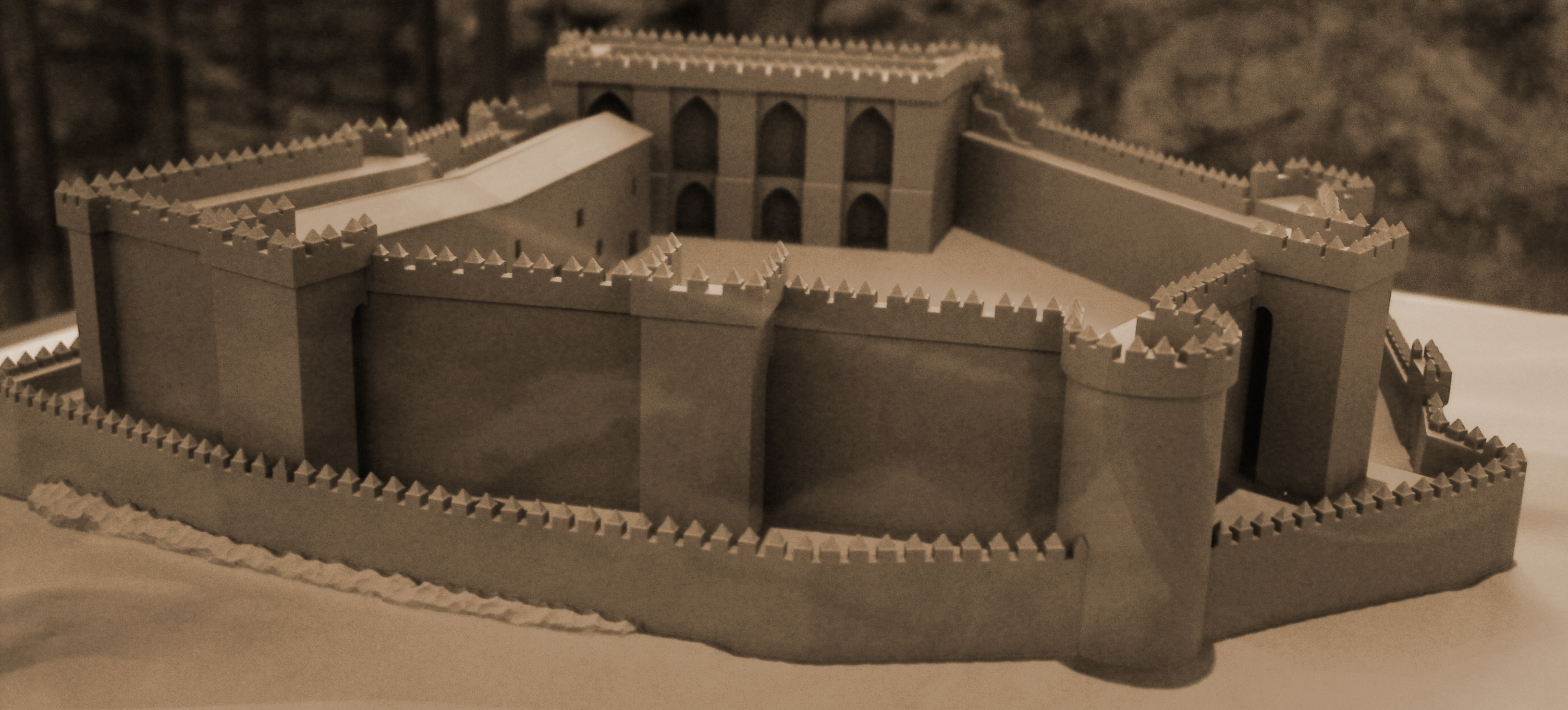 Maqueta, palacio rey Alfonso X, Castillo, Burgos, España